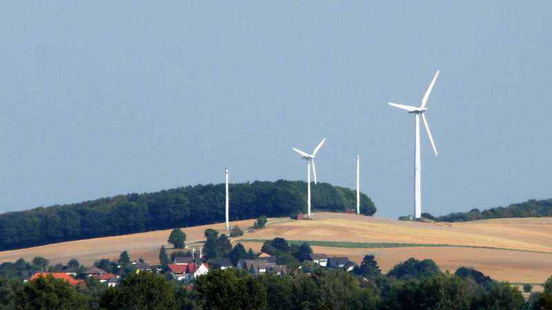 Auf den Vörier Berg befand sich eine der erstgebauten Windkraftanlagen des deutschen Binnenlands. Die drei um 1990 Jahre errichteten Turbinen des Typs Enercon E-32 wurden bis 2013 abgebaut und durch eine im Jahr 2000 in Betrieb genommene 1,3 MW starke Anlage des Typs AN Bonus ersetzt.